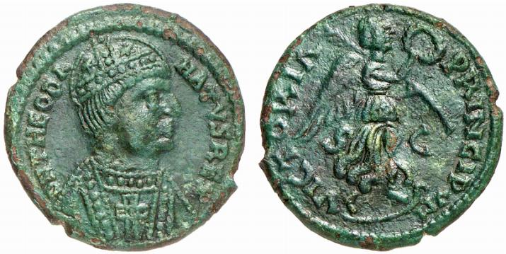 Münze: Follis des Ostgoten-Königs Theodahat (um 500-536), Aufschrift: DN THEODA-HATVS REX und VICTORIA PRINCIPVM